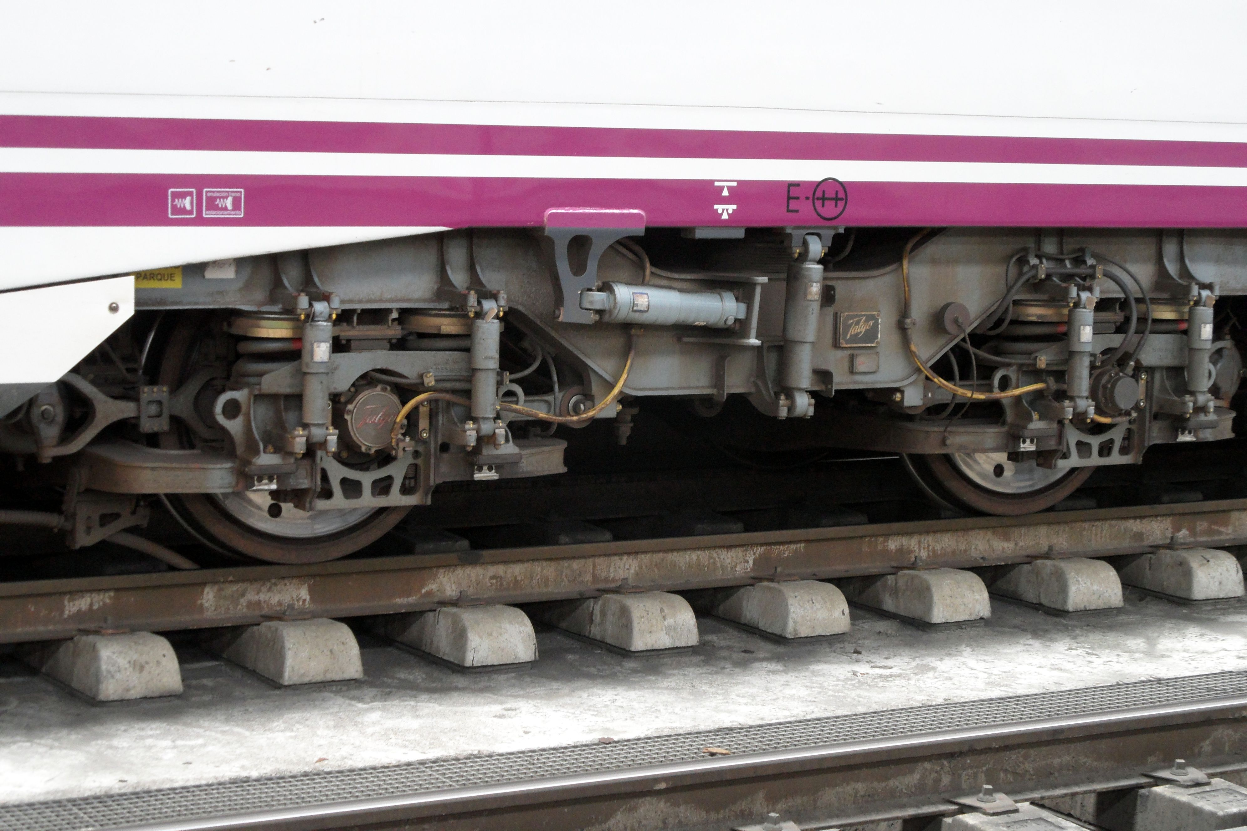 Seitenansicht auf Regelspur in Córdoba. Unter den Schwingungdämpfern der Primärfederung sind die Gleitstücke sichtbar, auf denen das Fahrzeug in der Umspuranlage gleitet, um die Radscheiben zu entlasten